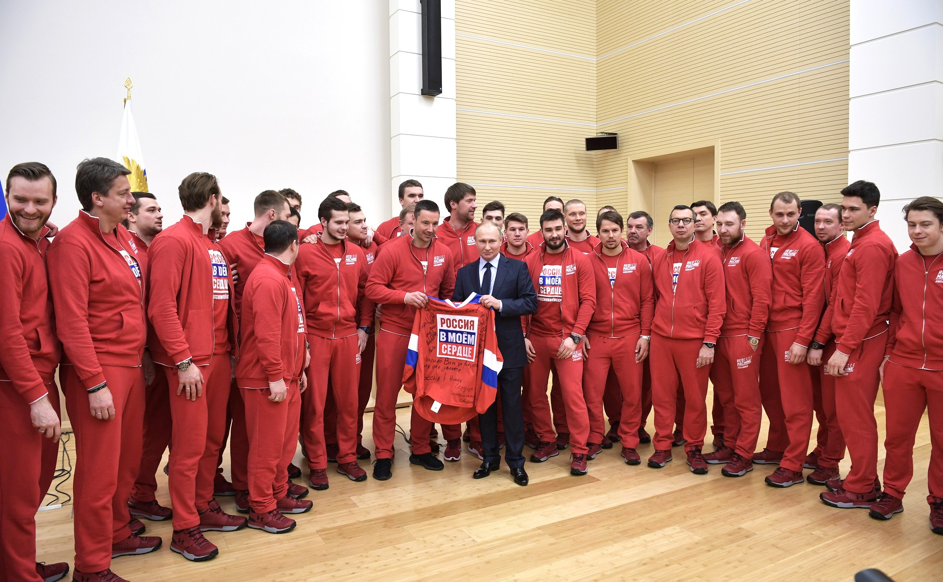 Встреча Президента России Владимира Путина с российскими спортсменами – участниками XXIII Олимпийских зимних игр 2018 года в Пхёнчхане.